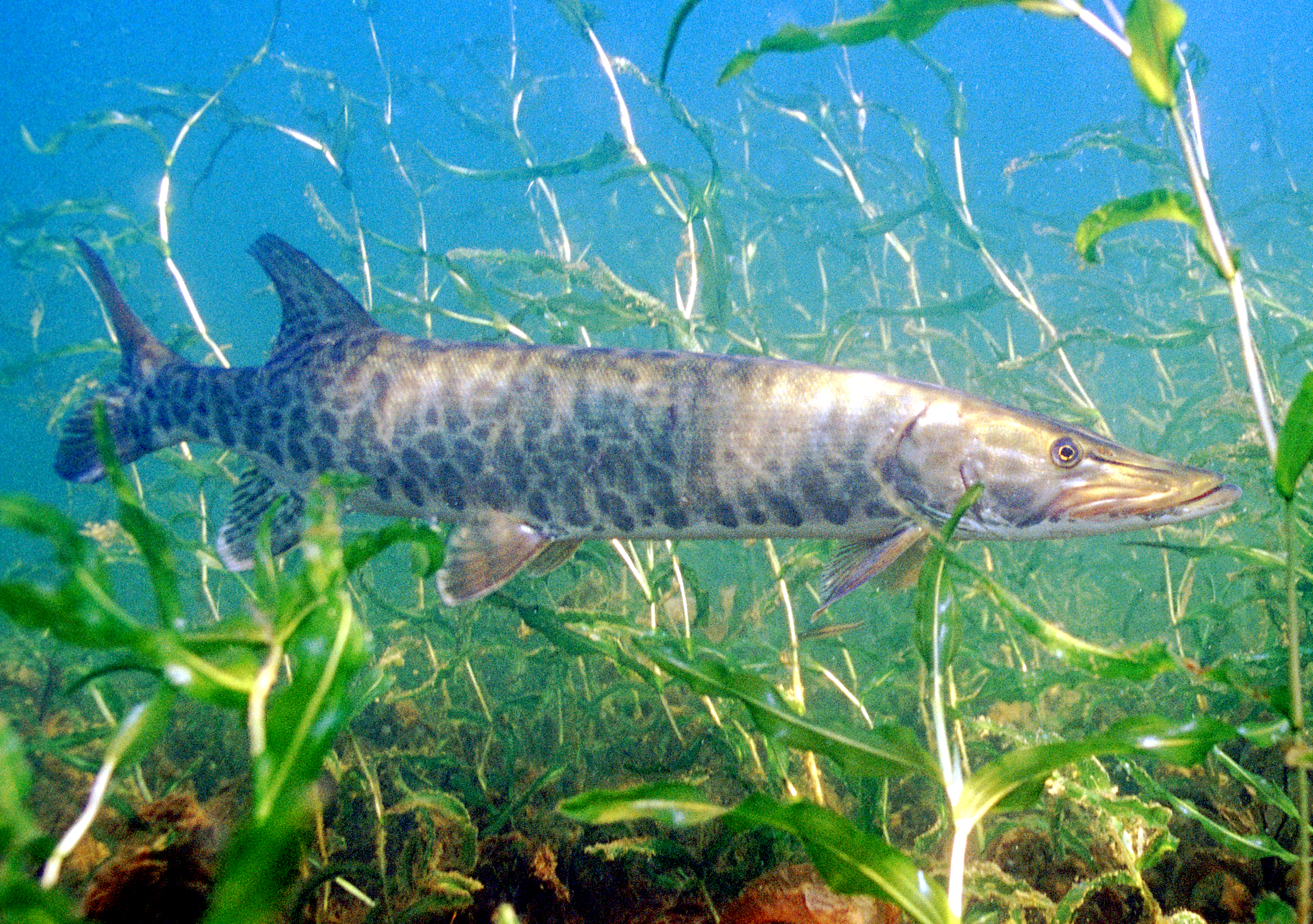 Muskellunge (Esox masquinongy)